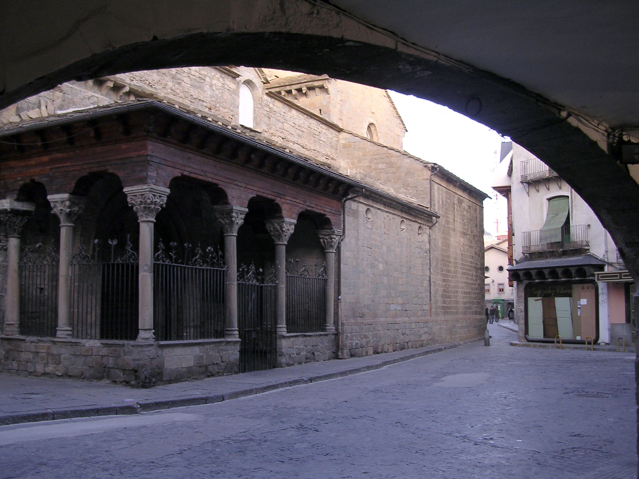 Puerta lateral de la catedral de San Pedro de Jaca